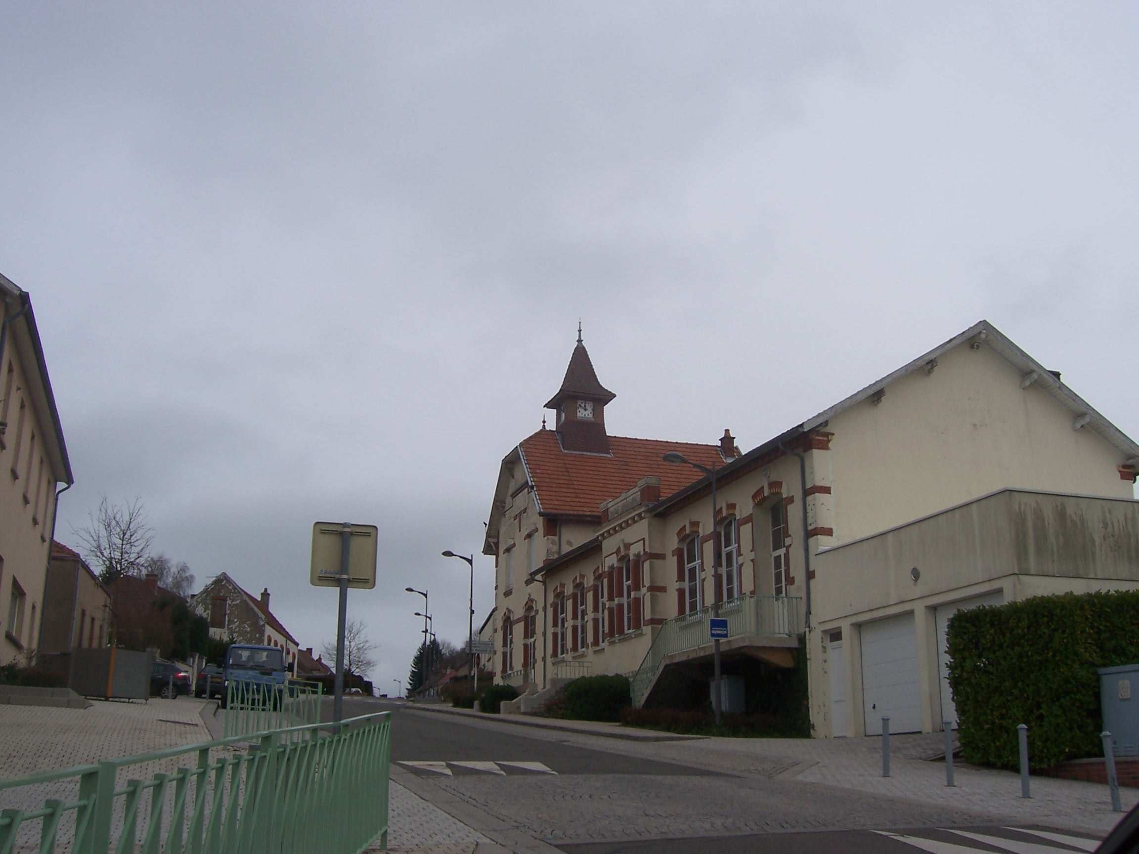 Ancienne mairie de Sanvignes-les-Mines